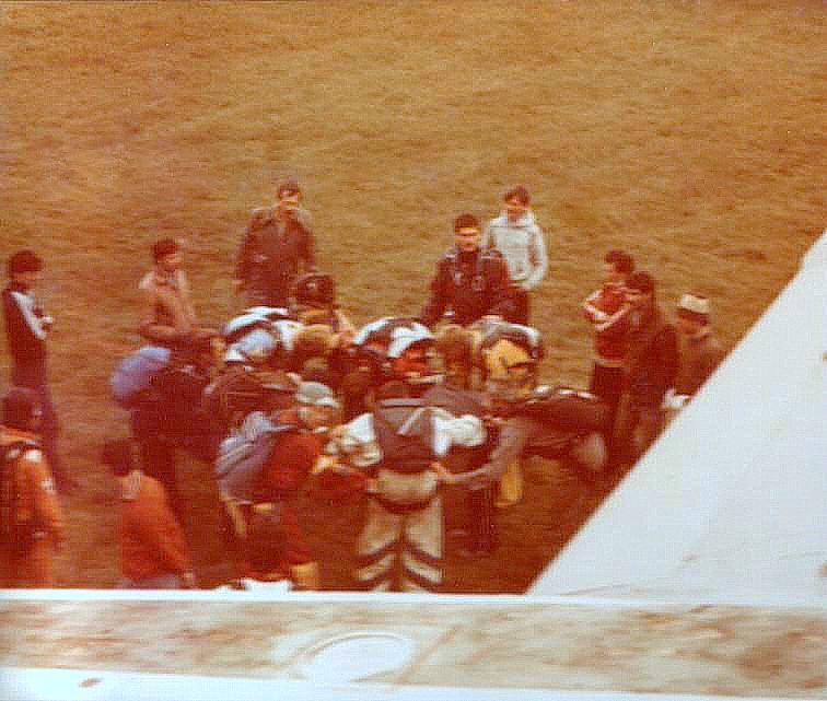 XV Spadochronowe Mistrzostwa Śląska Gliwice 1984, An-2TD SP-ANW. Tradycyjne po zakończonych zawodach przymierzono się do „wielkiej kupy“ - Sekcja Spadochronowa Aeroklubu Gliwickiego